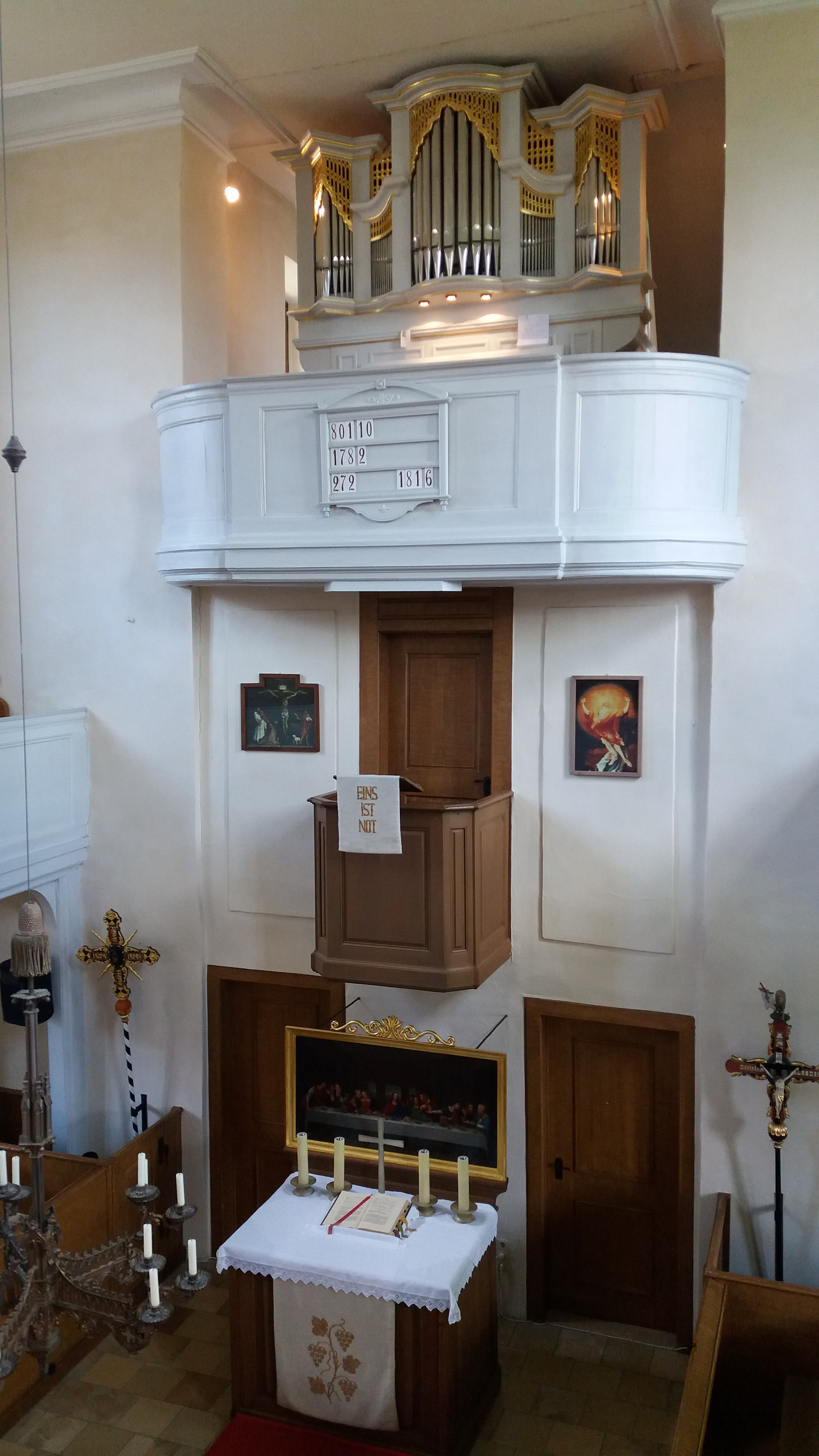 Im Kircheninneren, 2017